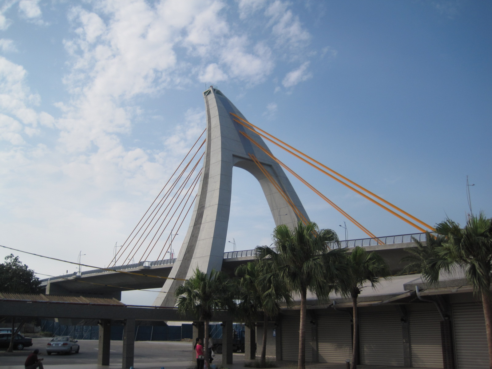 中文（台灣）: 位在屏東東港的鵬灣跨海大橋